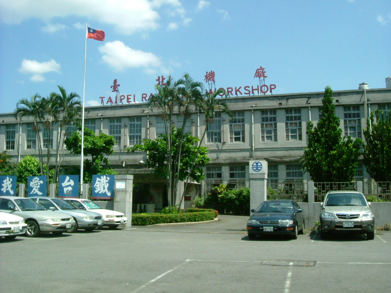 描述摘要:台鐵台北機廠正門 來源:自行拍攝 日期:2006.7.8 作者:台灣少年